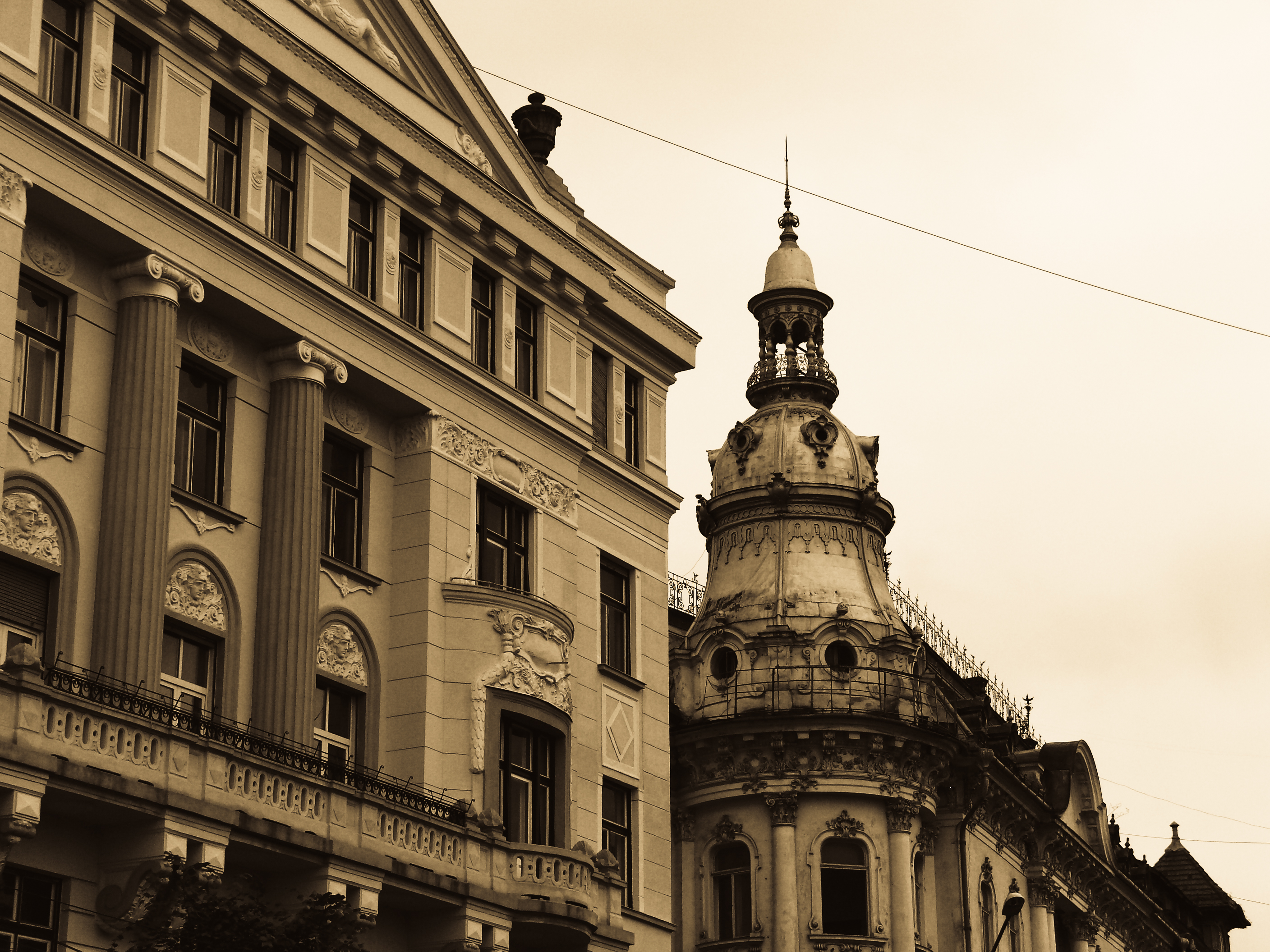 Palatul Sebestyen & Hotel Continental (fost Hotel New York)